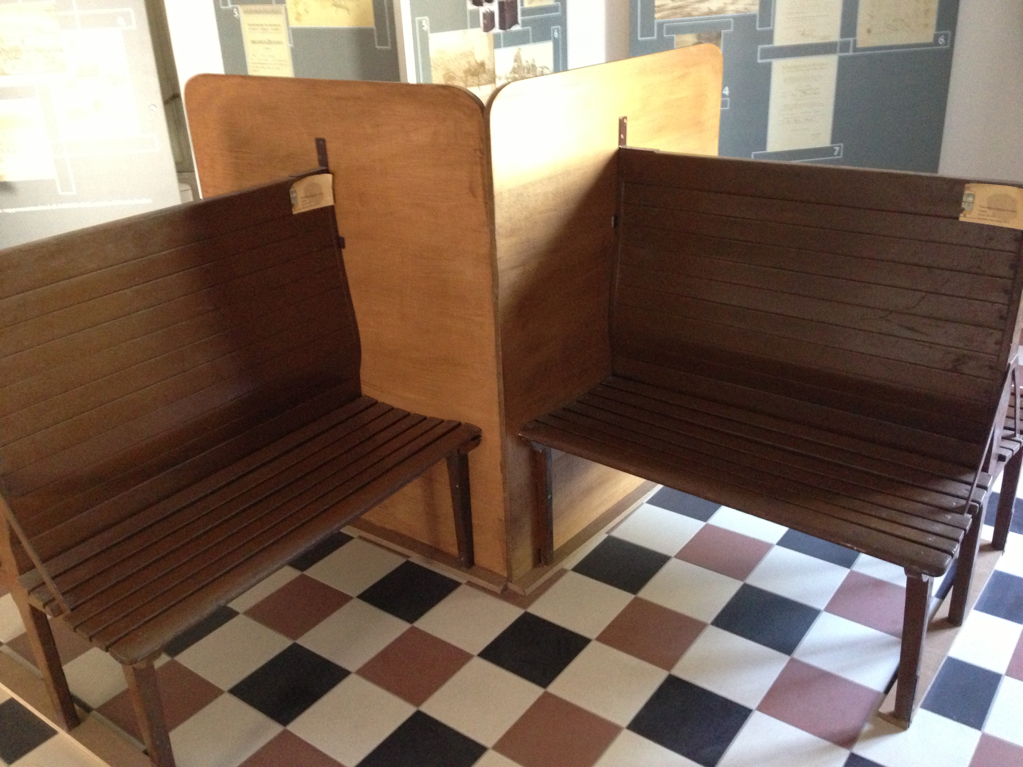 Le sedute in legno originali del treno